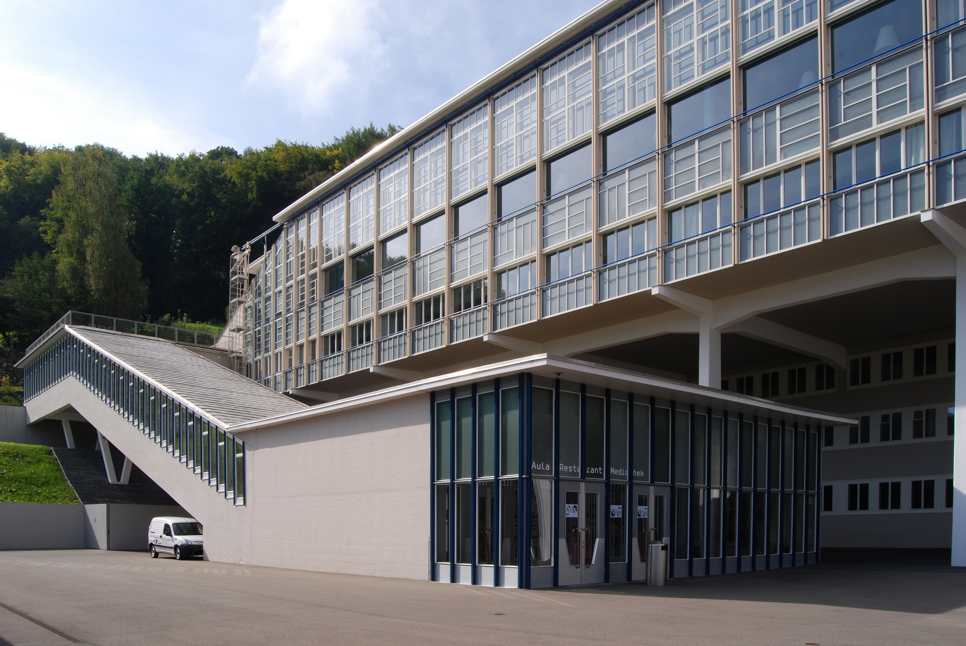 Gedeckter Aussenaufgang des ehemaligen BBC-Wohlfahrtsgebaeudes in Baden (AG, Schweiz)